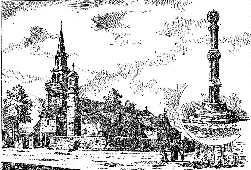 L'église de Ploezoc'h et la croix hosannière du cimetière (dessin de Louis Le Guennec, 1906)